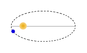 بقای تکانه در حرکت انتقالی زمین